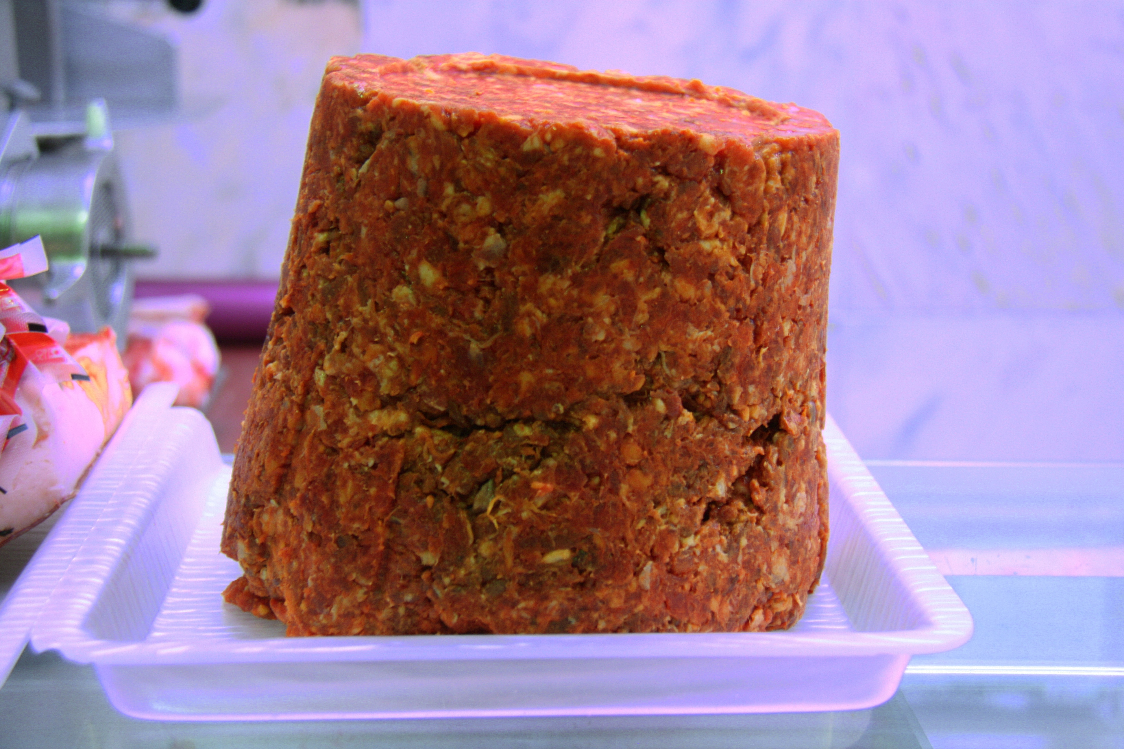 jijas (Gigote de carne de cerdo, carne de cerdo picada y adobada) - Valladolid